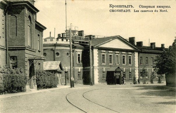 Рельсы у Северных казарм. Нынешняя улица Восстания